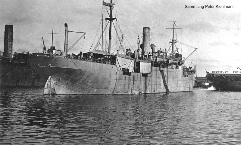 Der Frachter Rabenfels der DDG Hansa als HMS Raven II